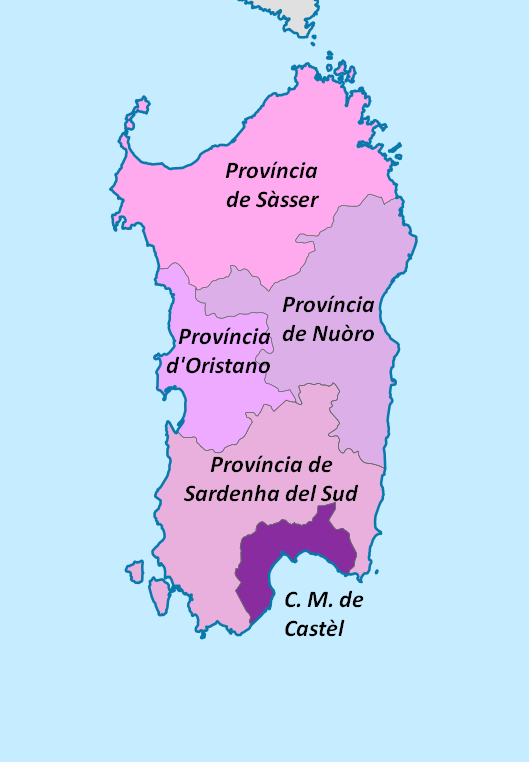 Divisions de Sardenha en 2016.